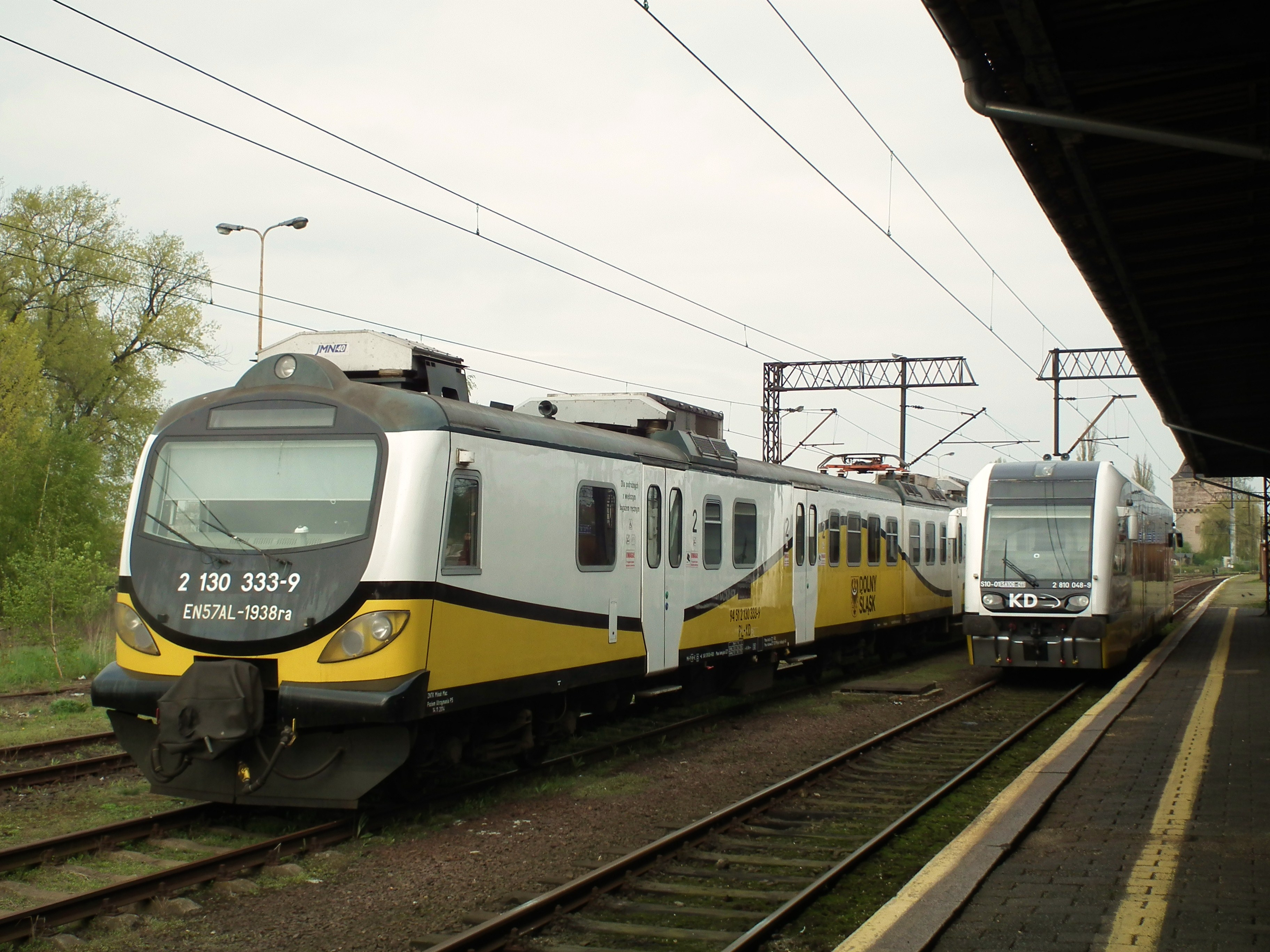 Legnica. EN57AL-1938 i SA106-011.